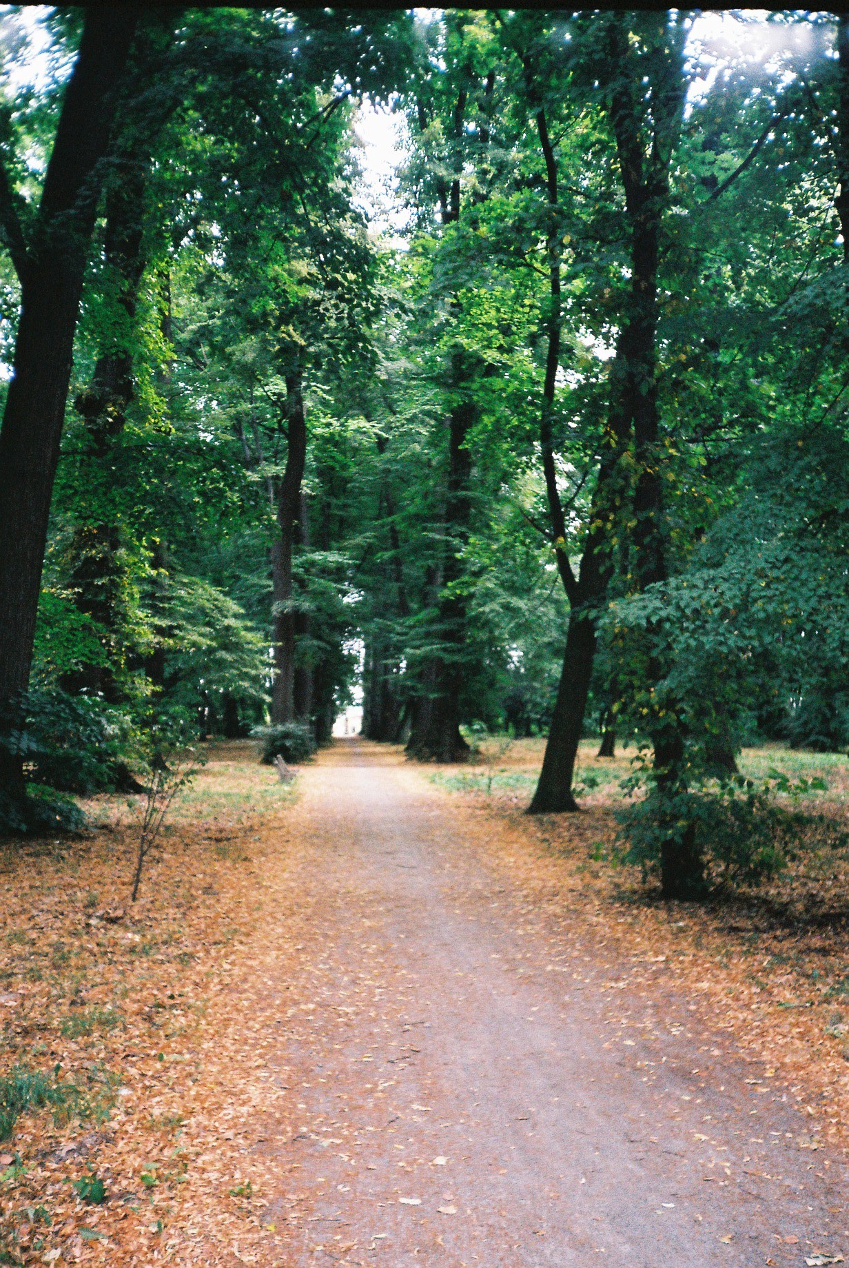 Aleja Bukowa w parku w Jelcz-Laskowicach. Fragment tej alejki możemy zobaczyć w filmie "Lalka".